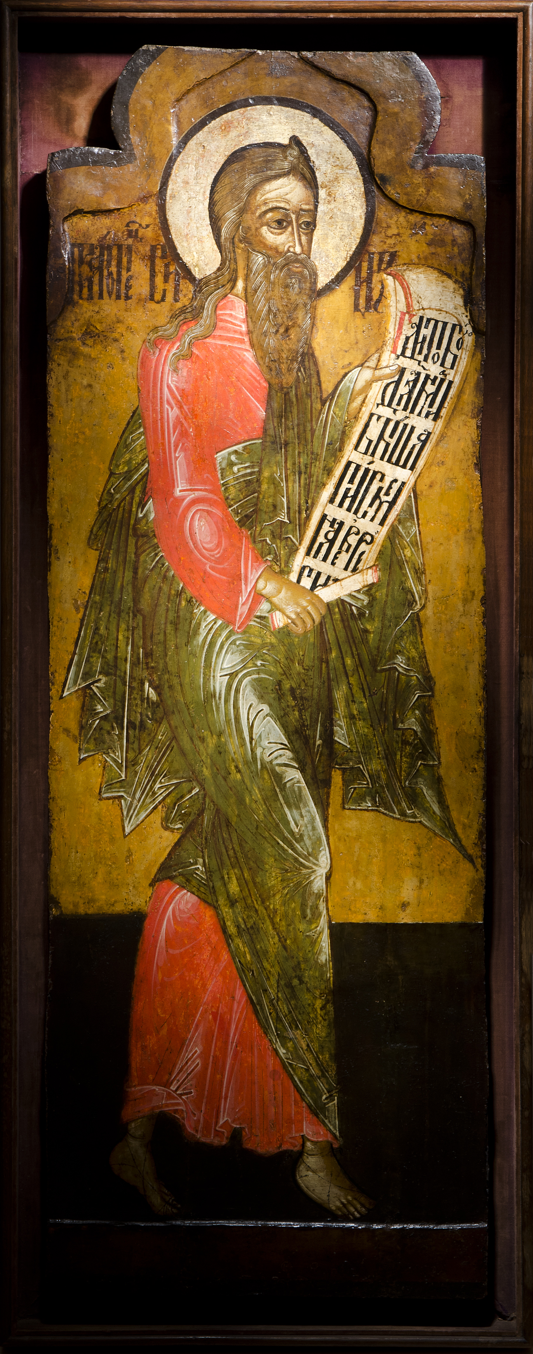 Exhibitor: Tóth-Ikonen Patriarch Seth Egg tempera on gesso on canvas on wood 146 x 51 cm Russia, 17th century Provenance: Collection Mr. L.J.M. Bouvy, Overveen (1874-1948); Private collection Netherlands Literature: J.H. Kruizinga, Ontmoetingen met verzamelaars, Neerbosch uitgeverij, Neerbosch, 1953, ill. p. 50; Exh. cat. Ikonen uit Noord-Rusland uit Nederlands bezit, Waanders uitgevers Zwolle, 1992, ill. p. 9, ill p.57 and ill. U-42 p. 76; Exh. cat. Het goddelijke nabij, Waanders uitgevers Zwolle, 2000, cat. no. 44 ill. p. 49. Exhibition: Utrecht, Rijksmuseum het Catharijneconvent, Ikonen uit Noord-Rusland uit Nederlands bezit, 1992, cat. no. U-42; Amsterdam, Bijbels Museum, Het goddelijke nabij, 15 december 2000-25 februari 2001, cat. no. 44